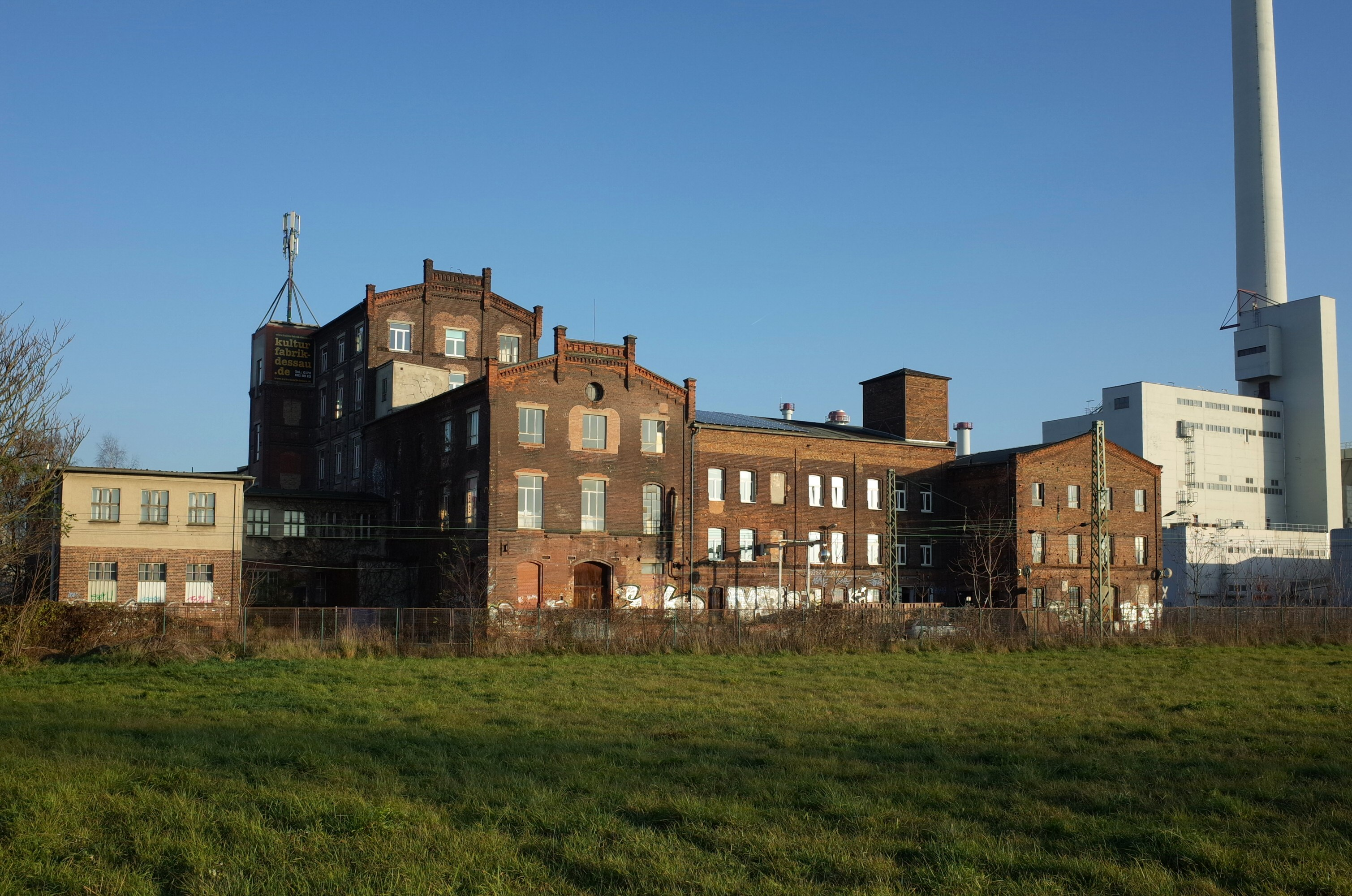 Dessau-Roßlau, Askanische Straße 156, Zuckerfabrik (Baudenkmal im Denkmalverzeichniss Sachsen-Anhalt, Erfassungsnummer: 094 40949 000 000 000 000 [1])